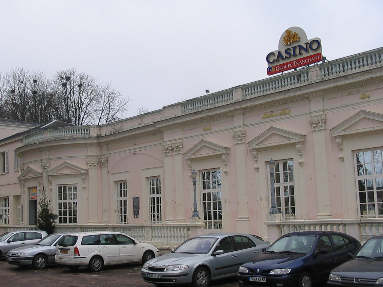 Casino du Nivernais à Pougues-les-Eaux (58). Je suis l'auteur du cliché pris en décembre 2004